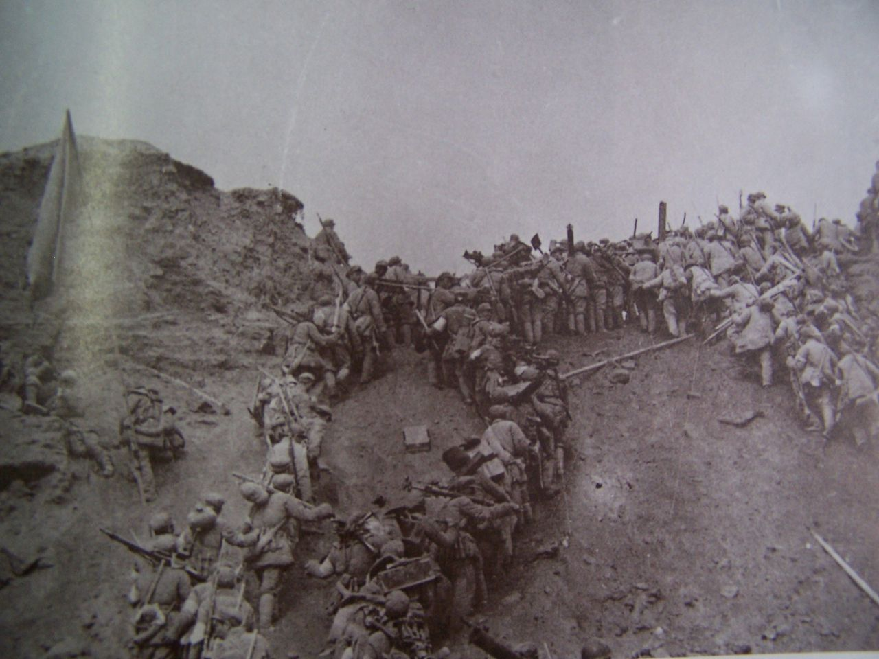 中文（中国大陆）: 太原战役